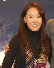 달빛 길어올리기 강수연, 박중훈